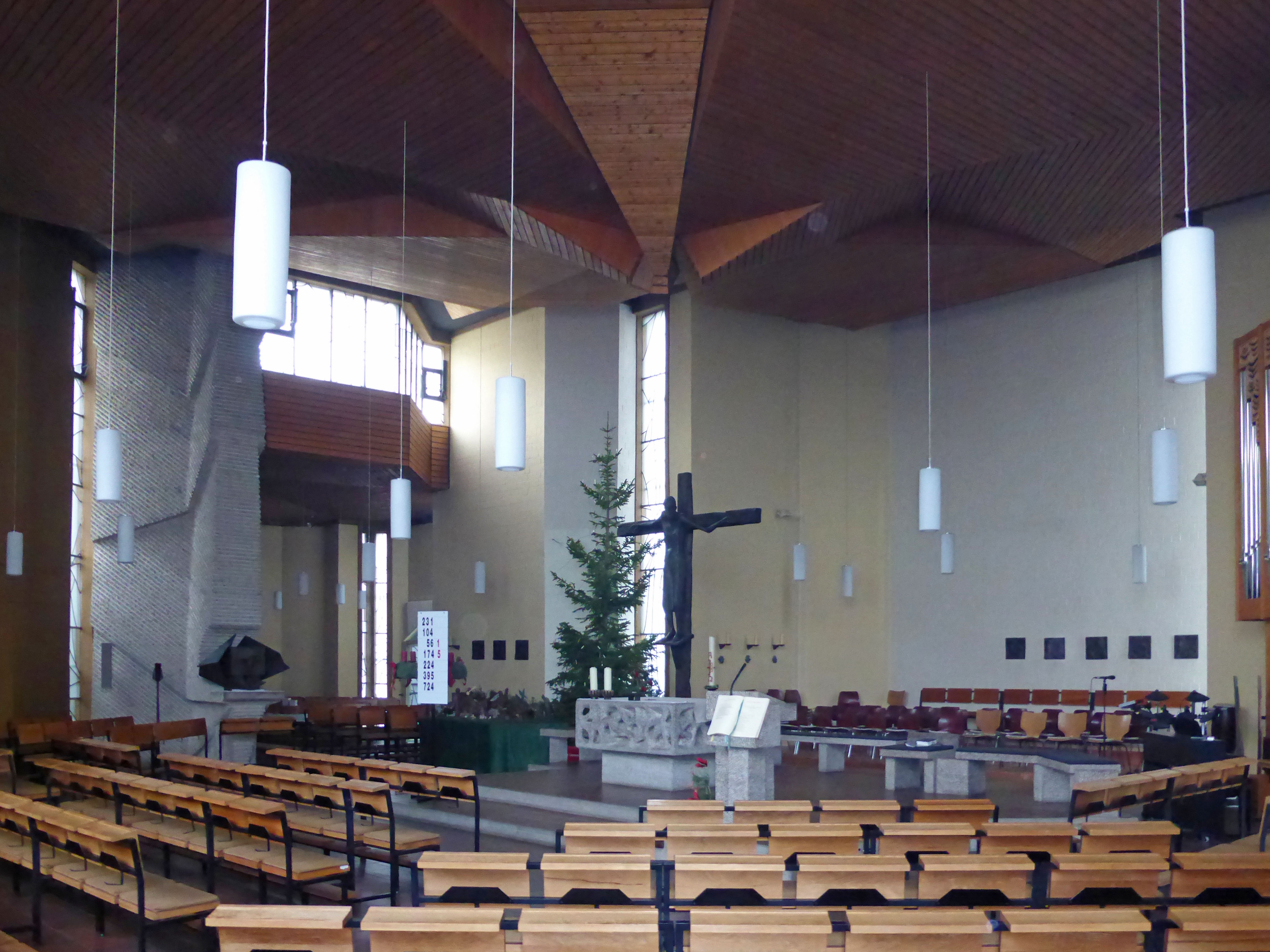 St.-Raphael-Kirche in Wolfsburg, Innenraum.